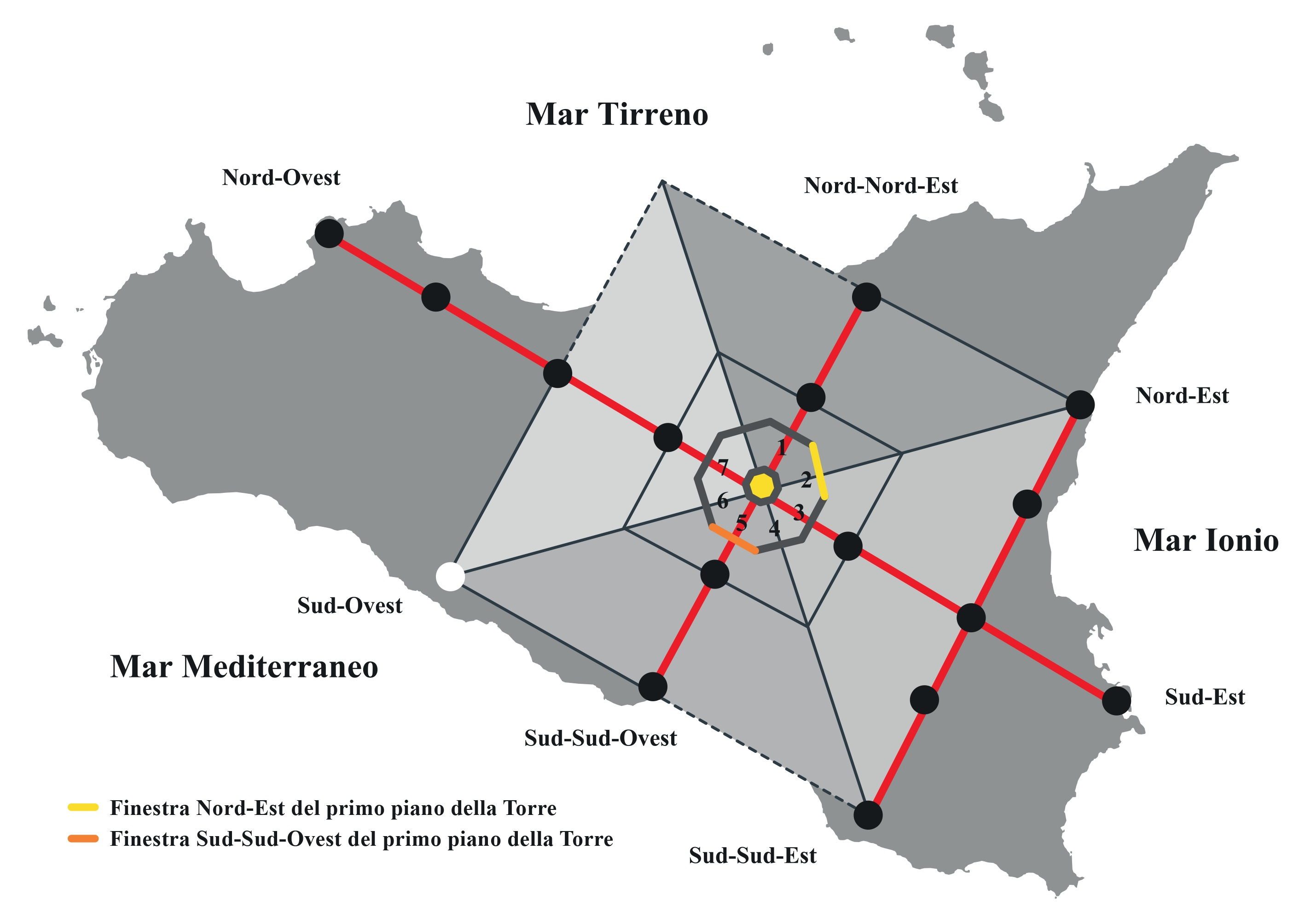 Il punto esatto in cui il decumano incontra il primo cardine fu sacralizzato, interpretando il volere degli Dei, e definito il centro gromatico dell’Isola di Trinacria, l’Ombelico della Sicilia e, come creduto dagli antichi, il centro del Mediterraneo e del mondo